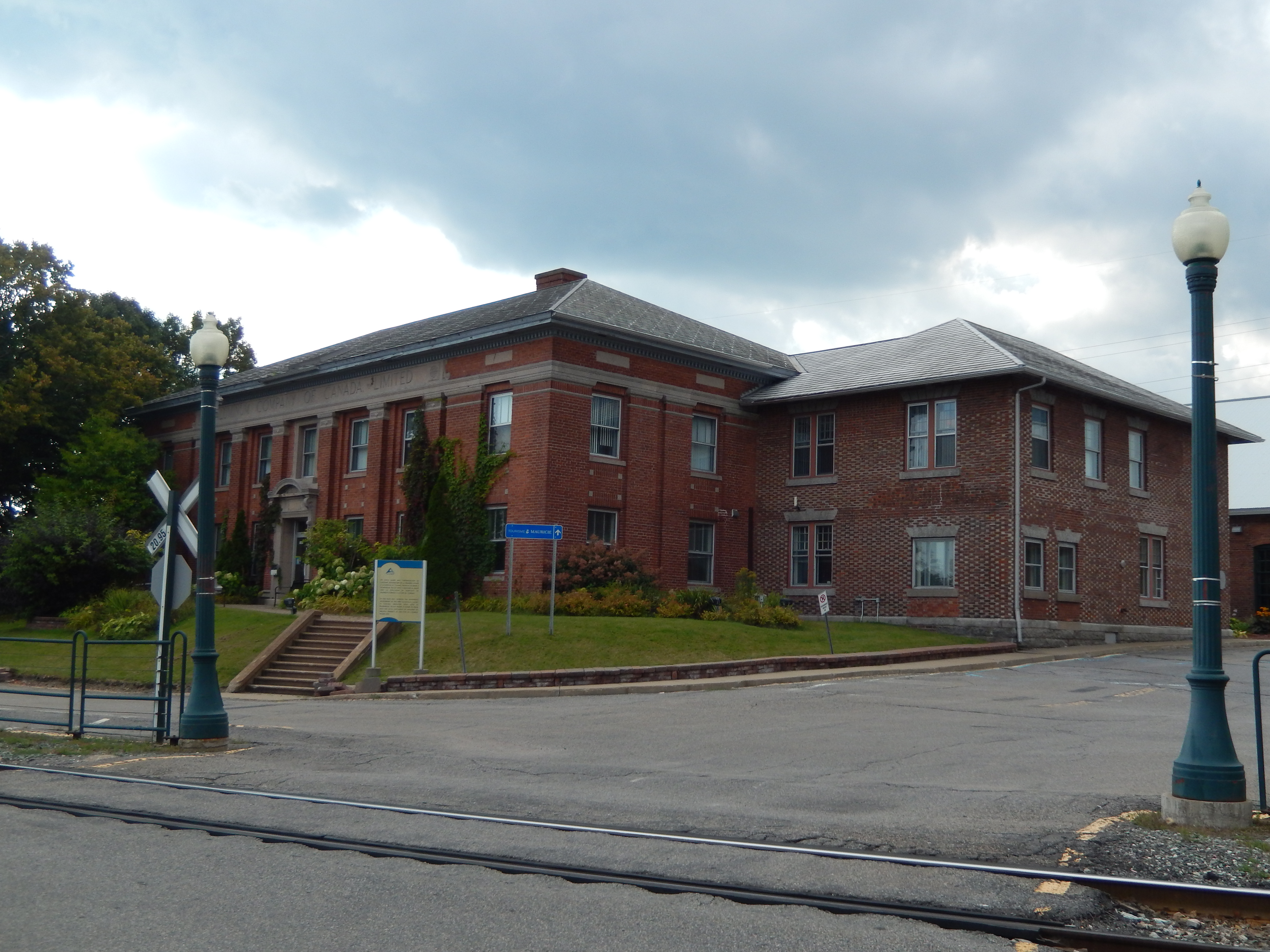 Bâtiment AL-22 de l'ancienne aluminerie de Shawinigan.